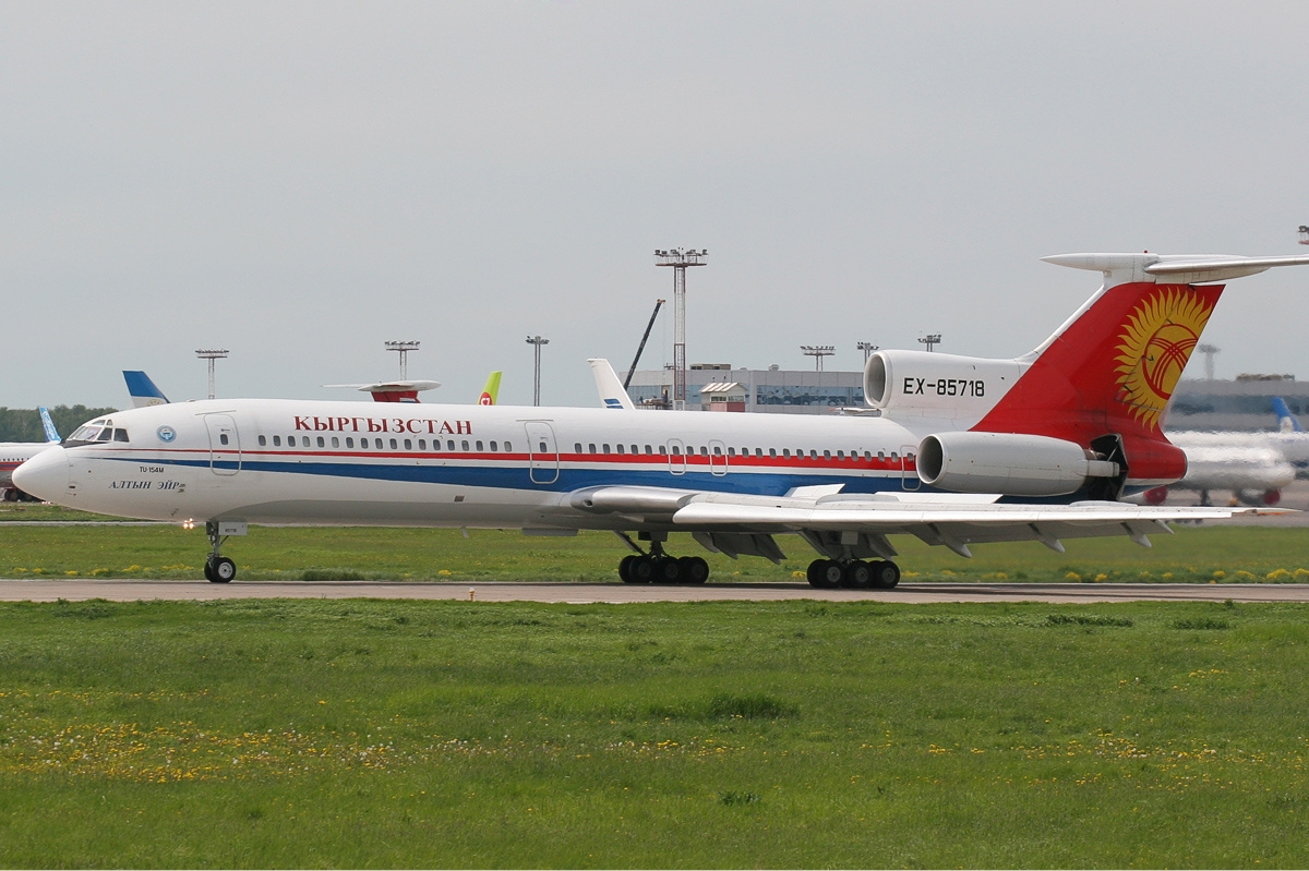 Kyrgyzstan (Altyn Air) Tupolev Tu-154M